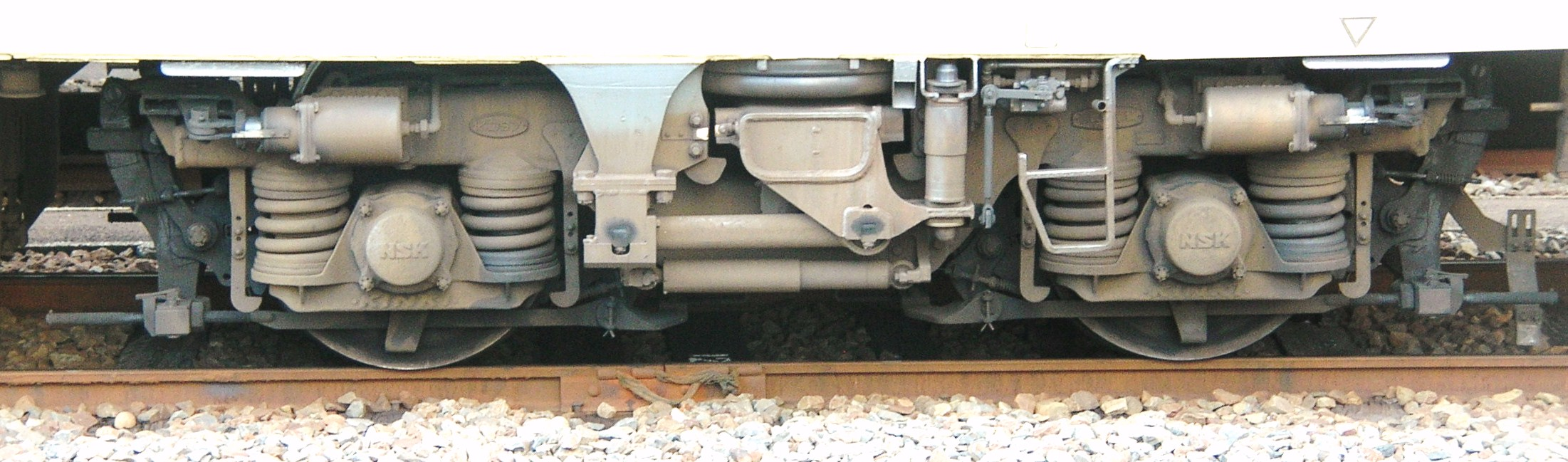 冨吉車庫にて撮影